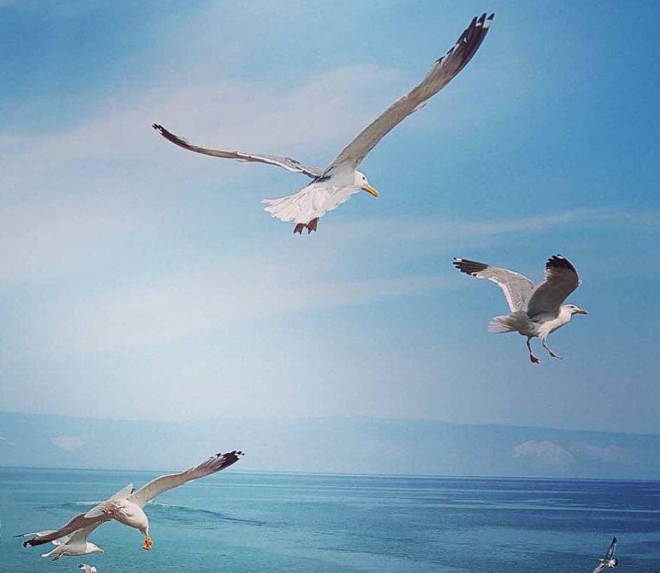 Laridae on Lake Baikal